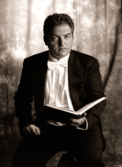 Portfolio di Francesco Anile